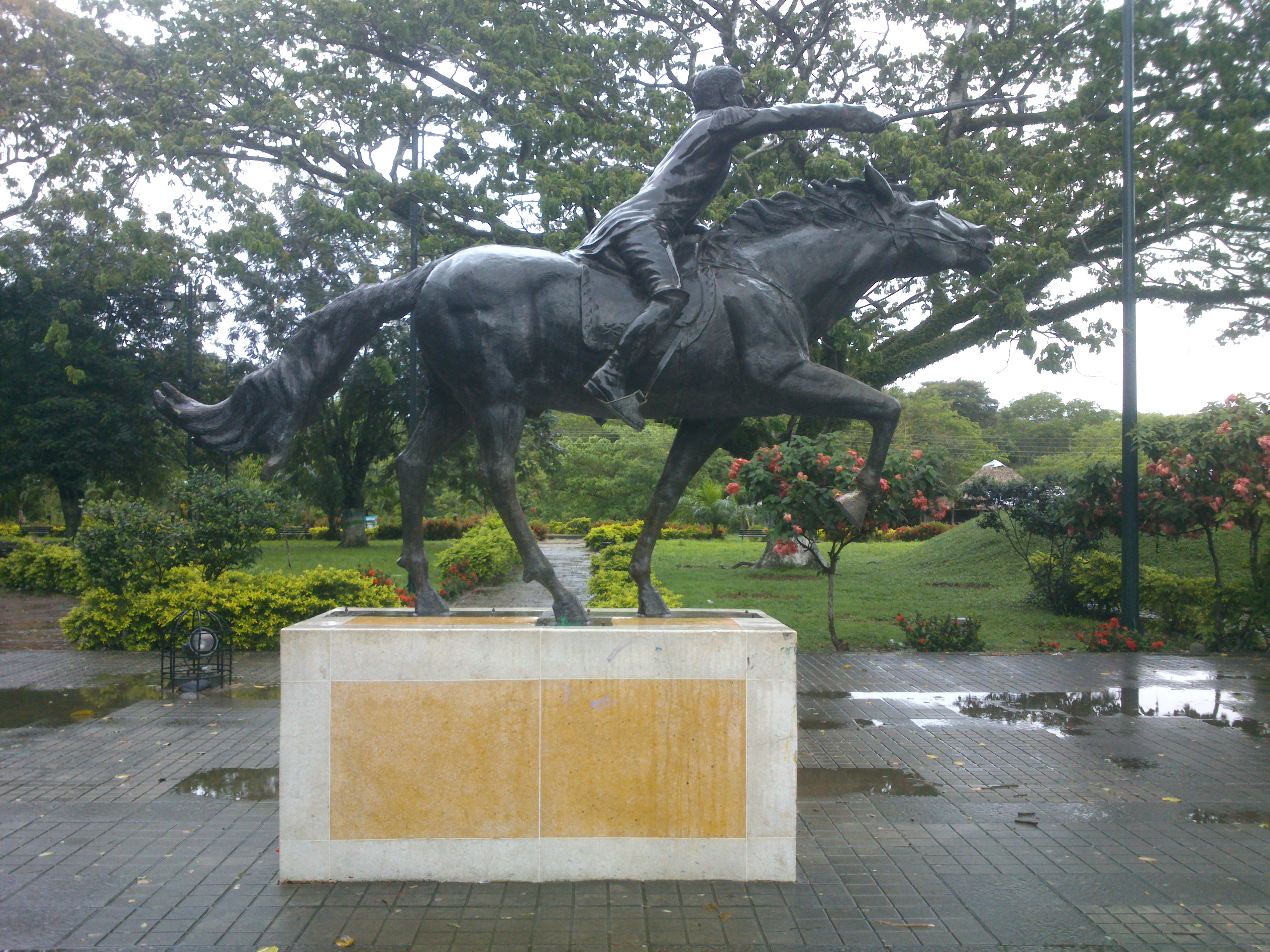 Ubicación: PUERTO RONDON, ARAUCA